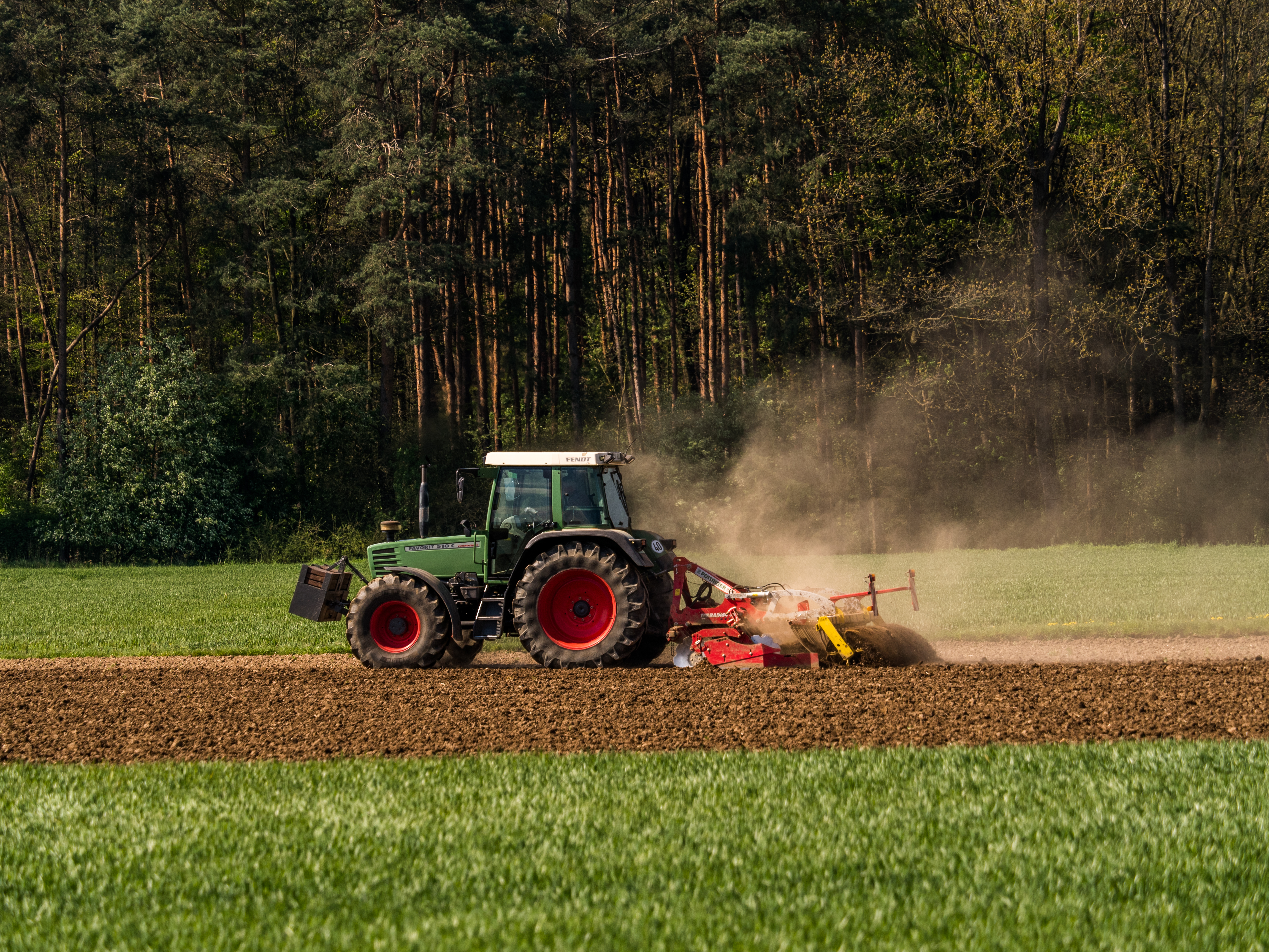 Fendt Favorit 501C mit Pöttinger Kurzscheibenegge 3001